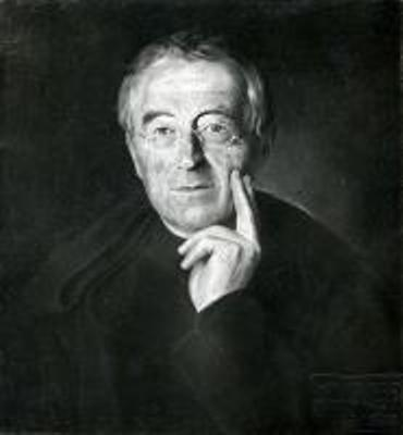 Porträt des Schweizer Benediktiners und Komponisten Anselm Schubiger